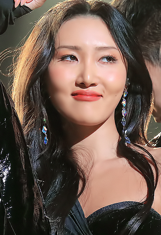 200108 가온 뮤직 어워즈 멍청이 무대 중인 화사